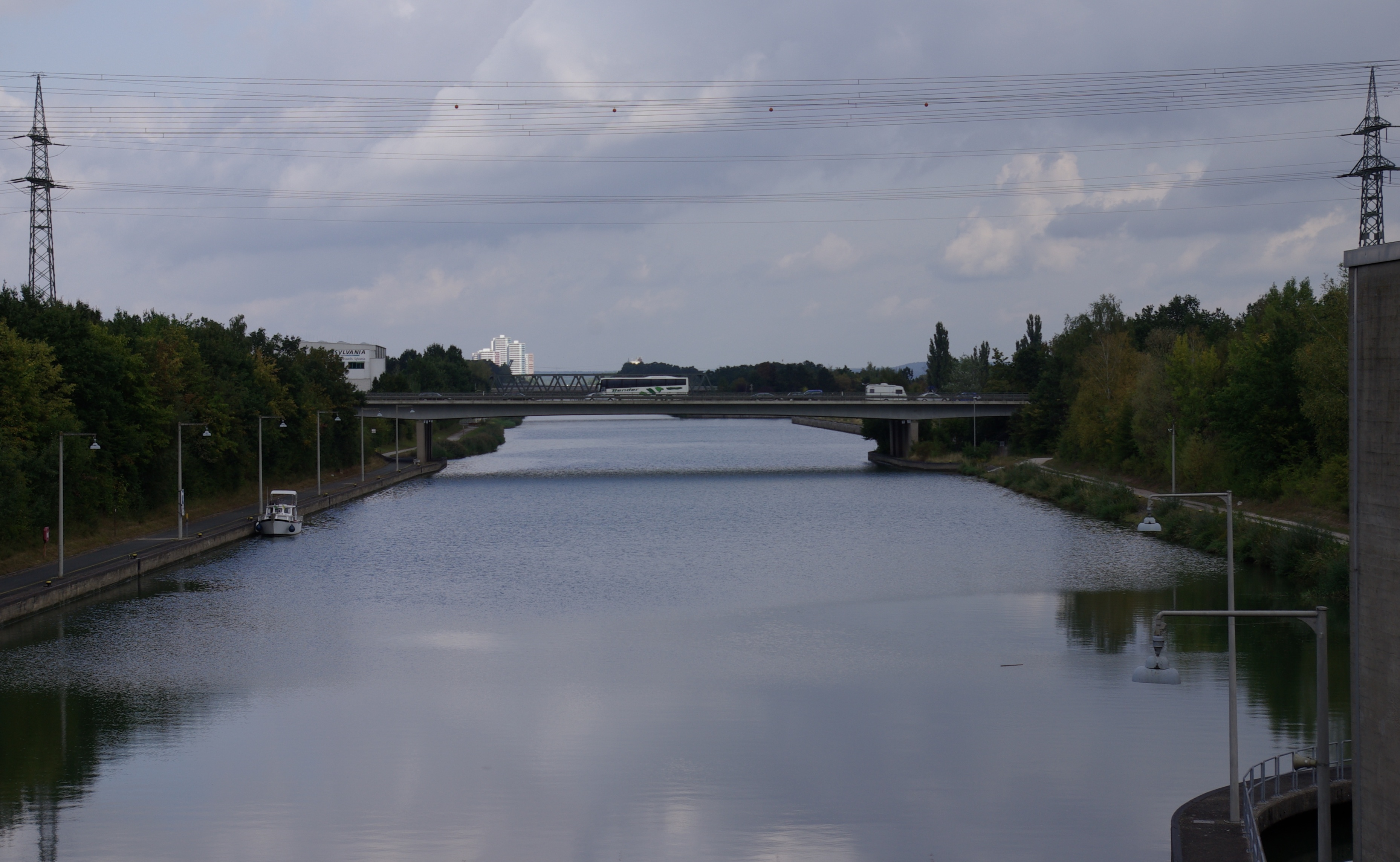 Der Main-Donau-Kanal bei Erlangen-Kriegenbrunn mit der Brücke der Bundesautobahn 3